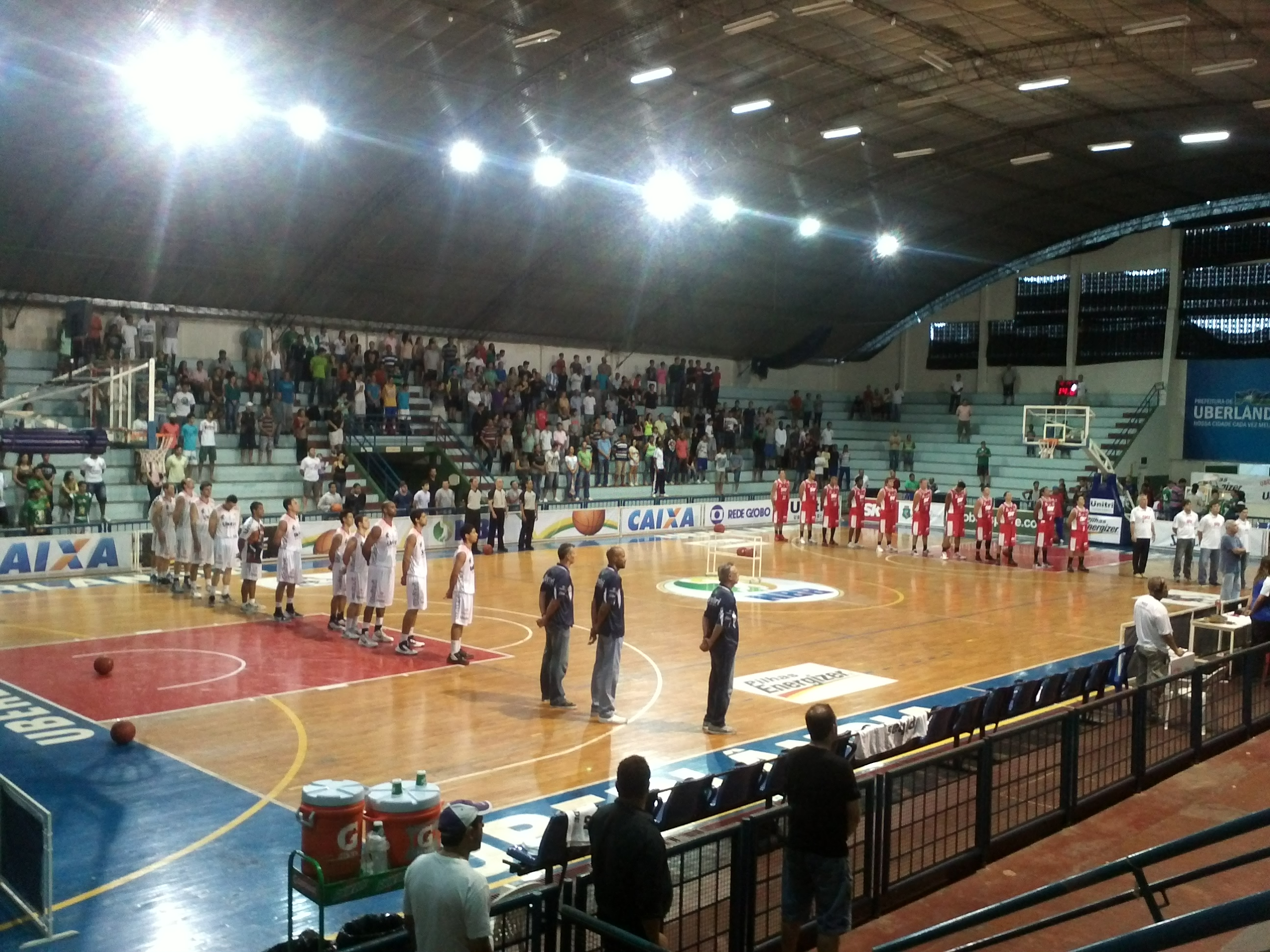 Perfilamento antes do jogo entre Unitri\Uberlândia contra Basquete Cearense no Uberlândia Tenís Clube.